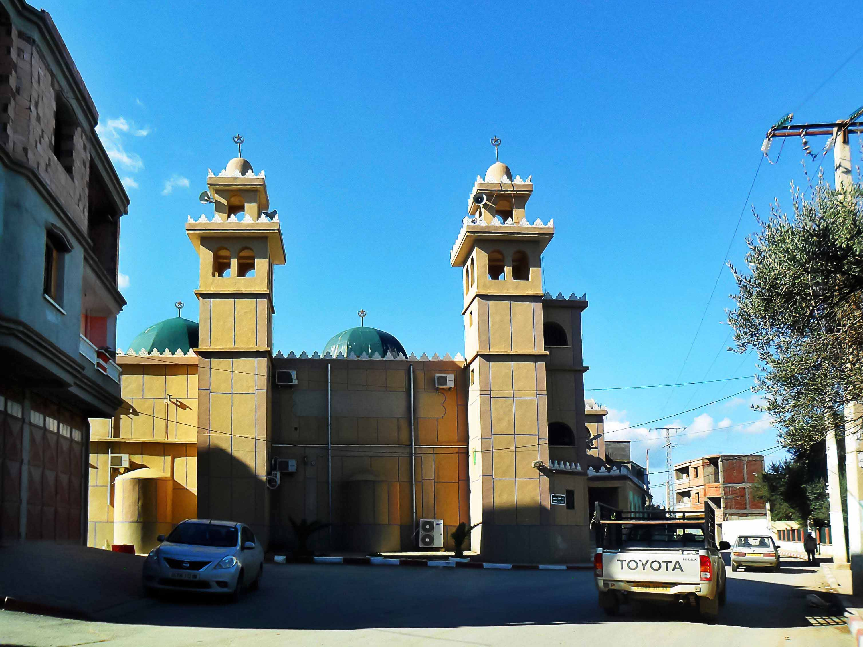 Zaouia - Guerouaou زاوية